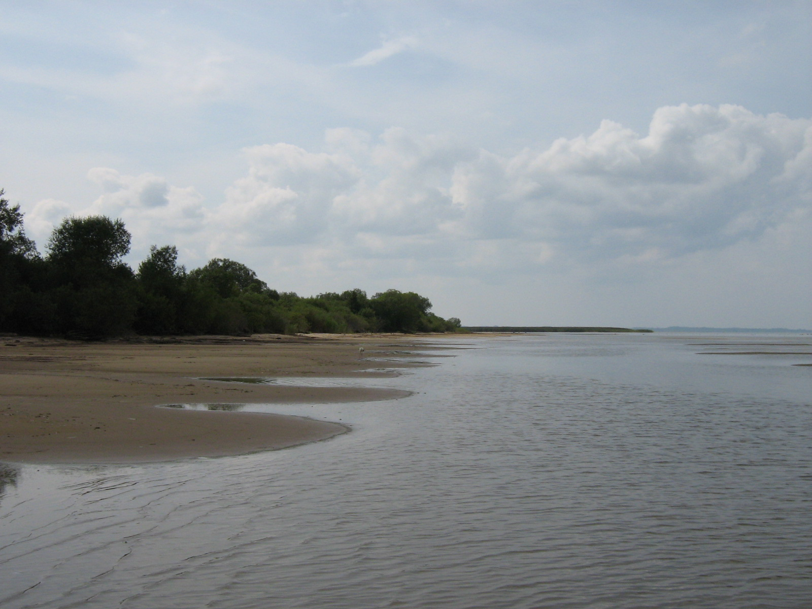 Rand Piirissaare kaldal